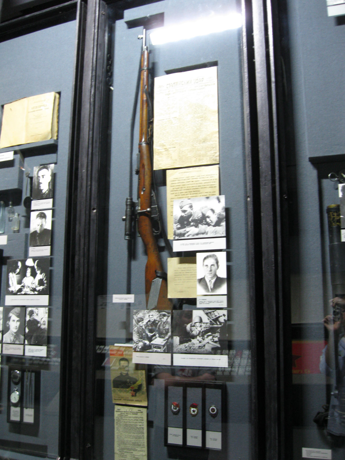 Экспонаты музея-панорамы «Сталинградская битва». Снайперская винтовка Героя Советского Союза В.Г.Зайцева